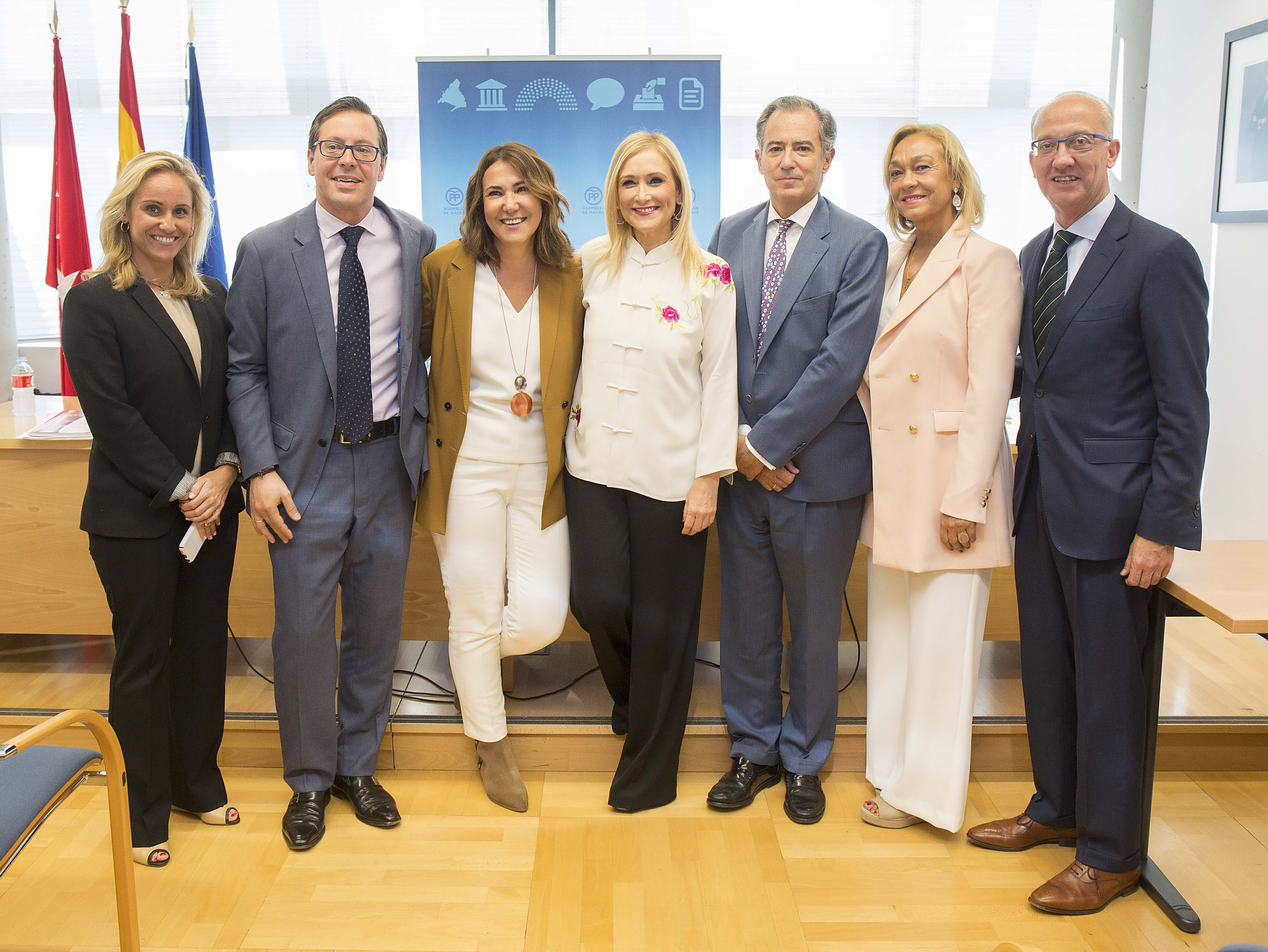 Antes del Pleno de la asamblea hemos tenido una nueva reunión del Grupo Popular en la asamblea de Madrid con cambios en la dirección para afrontar la segunda parte de la legislatura con más fuerza. Hoy se han estrenado, como consejeros, en el Pleno de la Asamblea los nuevos miembros de mi equipo de gobierno a los que quiero darles la bienvenida. Mi gobierno está hoy más fuerte y con más ganas de seguir impulsando las políticas votadas por los madrileños Hay una cuestión clara, con lo que está pasando en Cataluña, hoy es un día para apoyar al Gobierno de España, a la justicia y a las Cuerpos y Fuerzas de Seguridad del Estado, no como Podemos a los que debería darles vergüenza defender el acoso al que se están viendo sometidos la policía y la Guardia Civil.